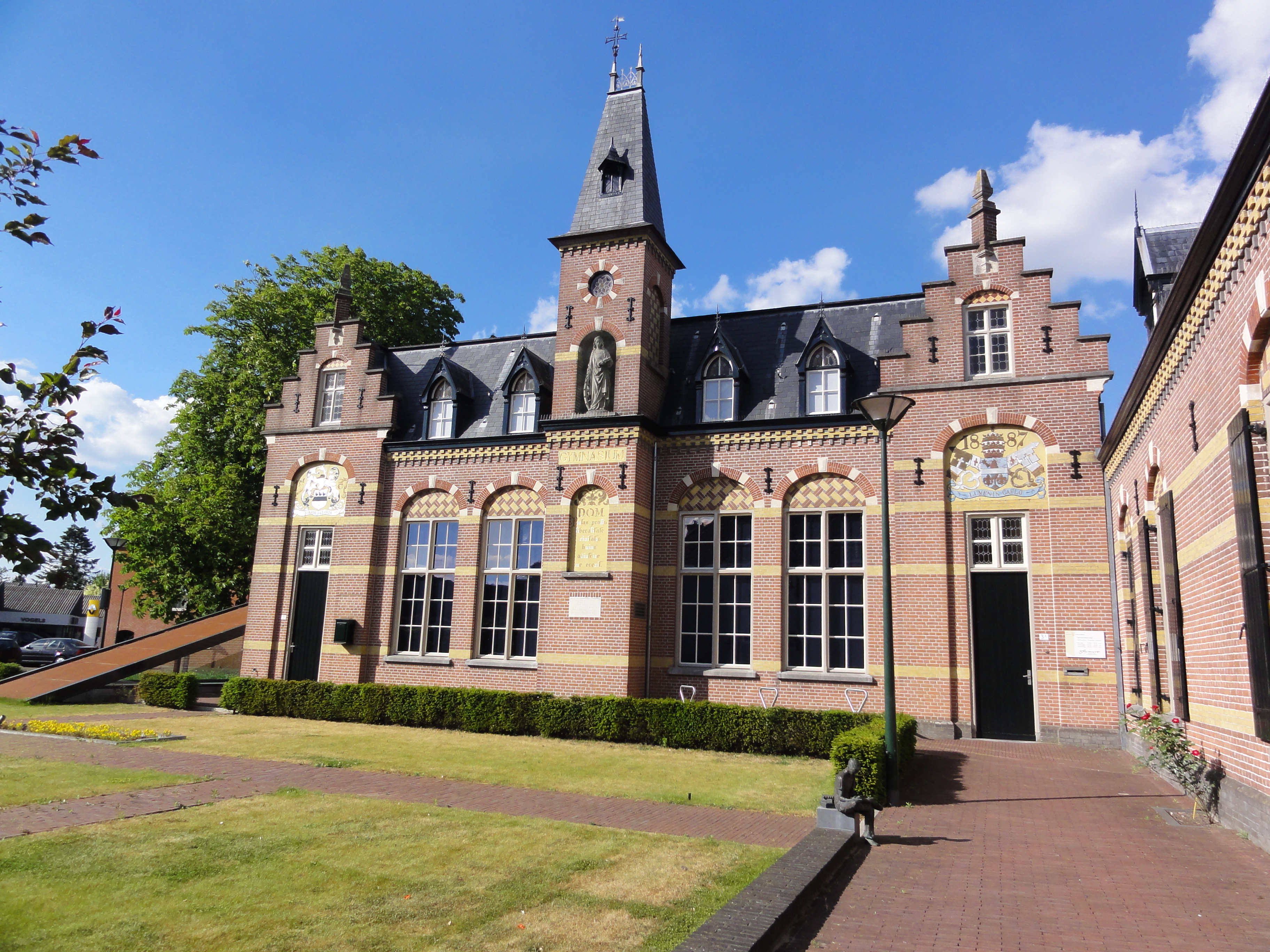 Gemert